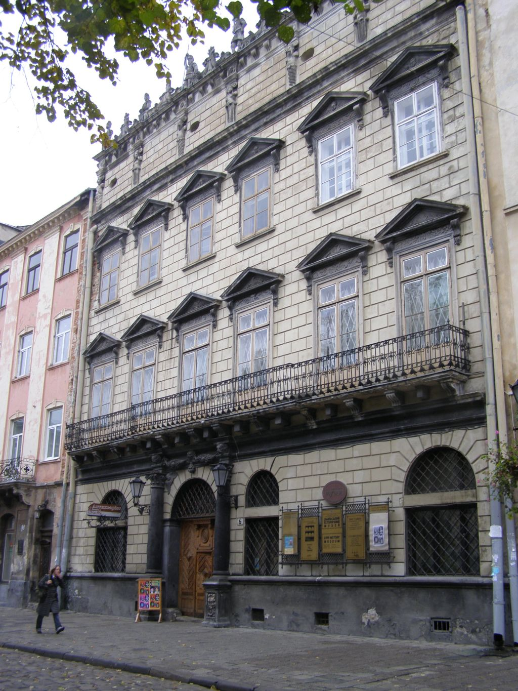 Kornyakt Palace in Lviv, Ukraine